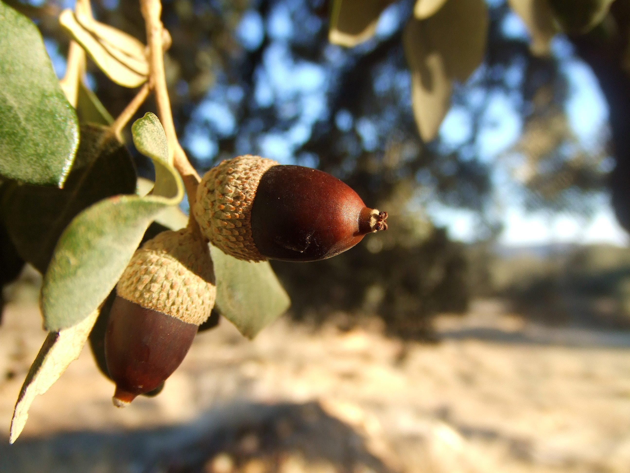 Fotografía de bellotas de una carrasca o encina